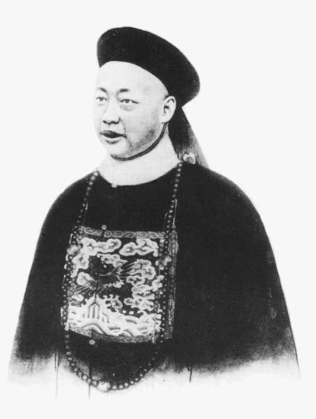 熙元（？－1900年），喜塔腊氏，字吉甫，晚清官员、画家。满洲正白旗人。直隶总督裕禄子。